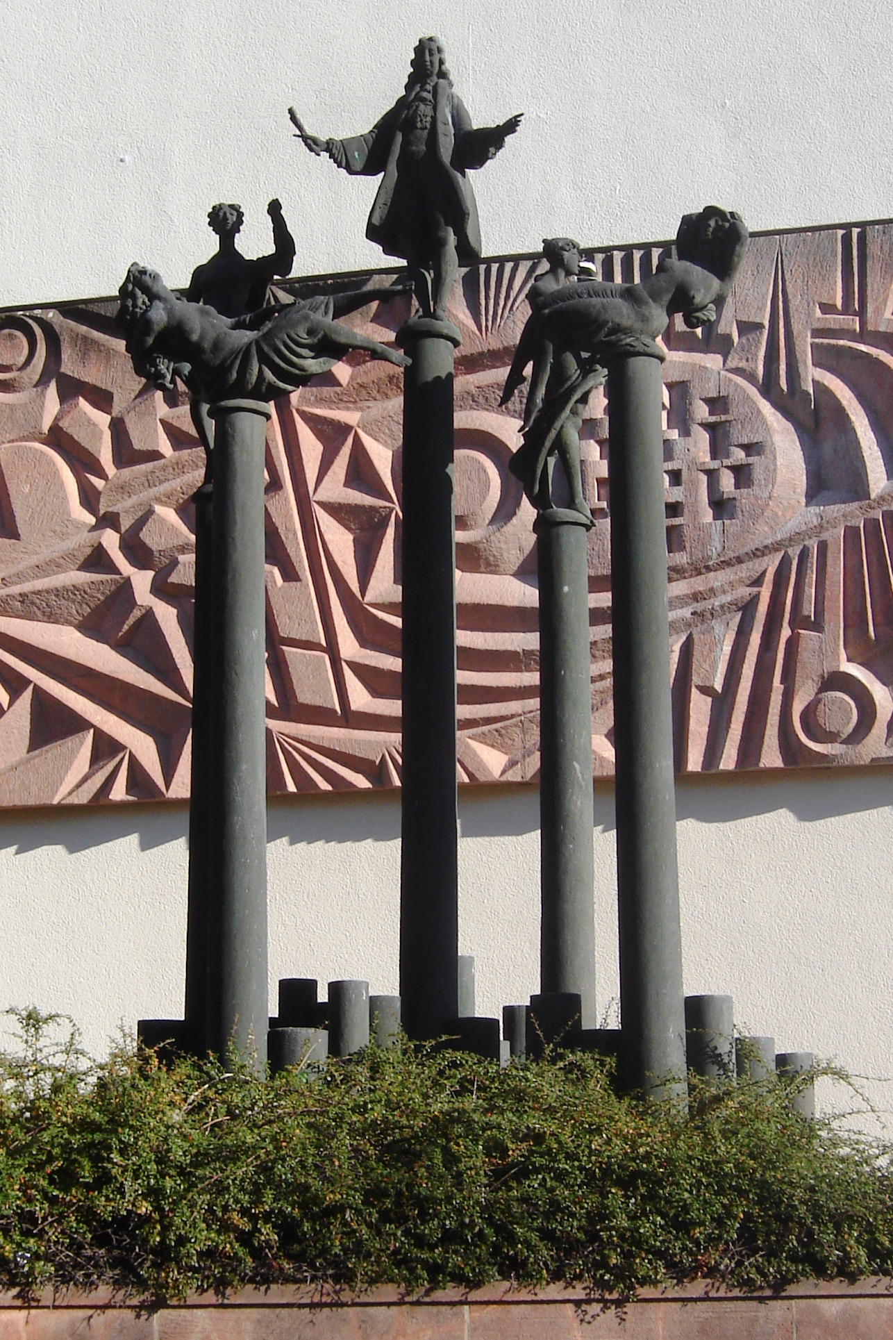 Magdeburg, Telemanndenkmal